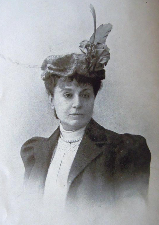 Marie-Louis Peyrat, marquise Arconeti-Visconti